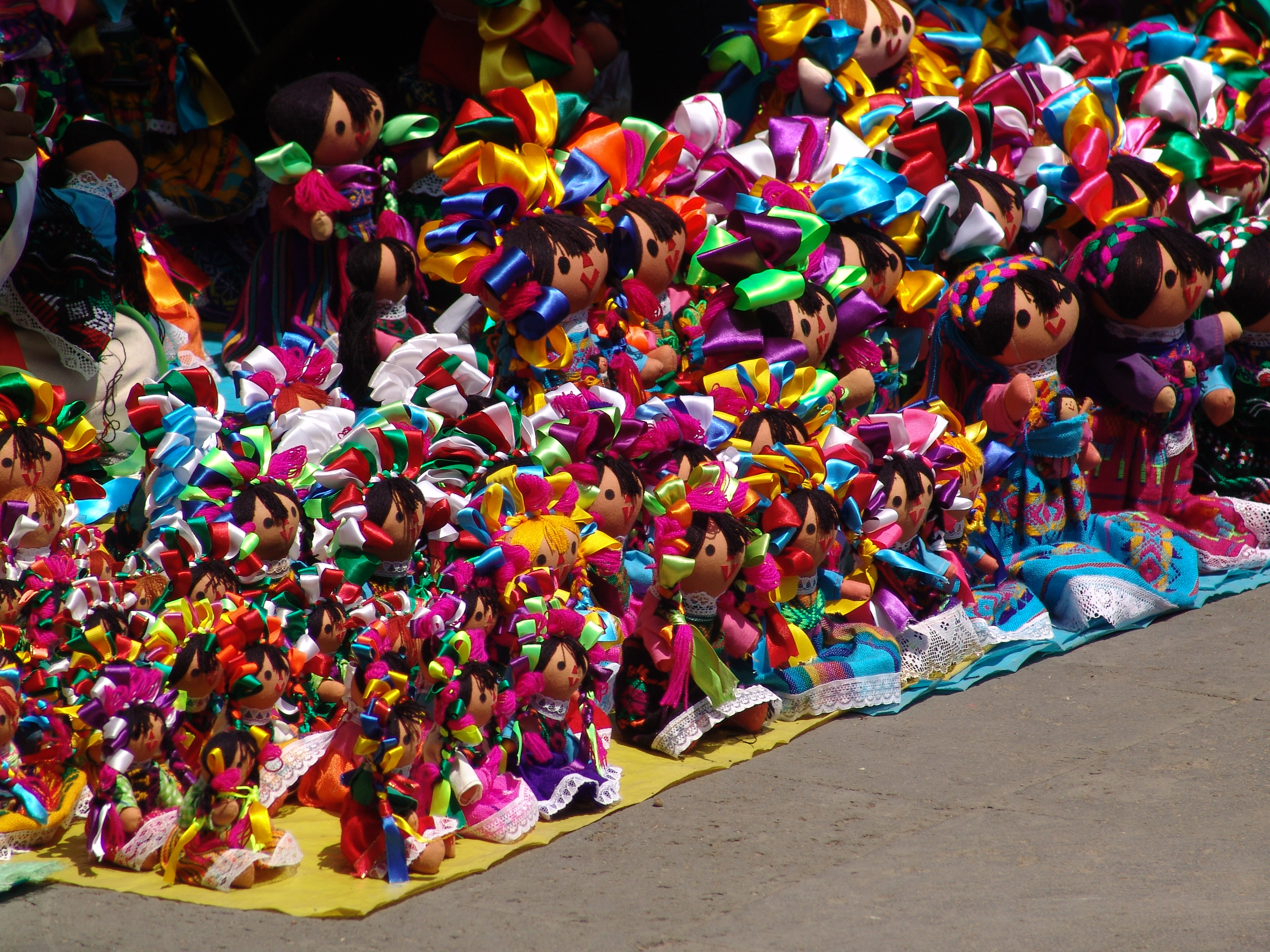 Artesanías originarias del Bazar del Sábado. Ciudad de México, San Ángel, Distrito Federal, Álvaro Obregón.